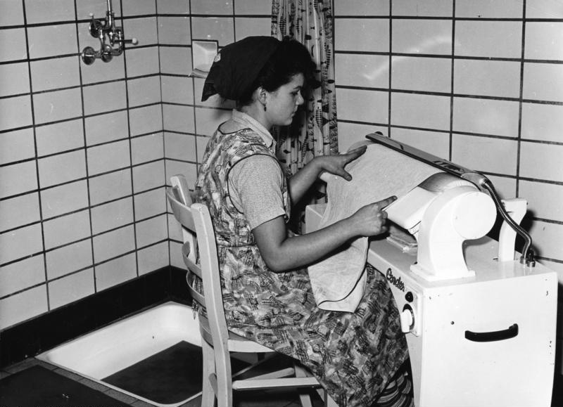 Landwirtschaftliche Aufnahmen in Lobberich bei Viersen am 20.9.1957 Information added by Wikimedia users.